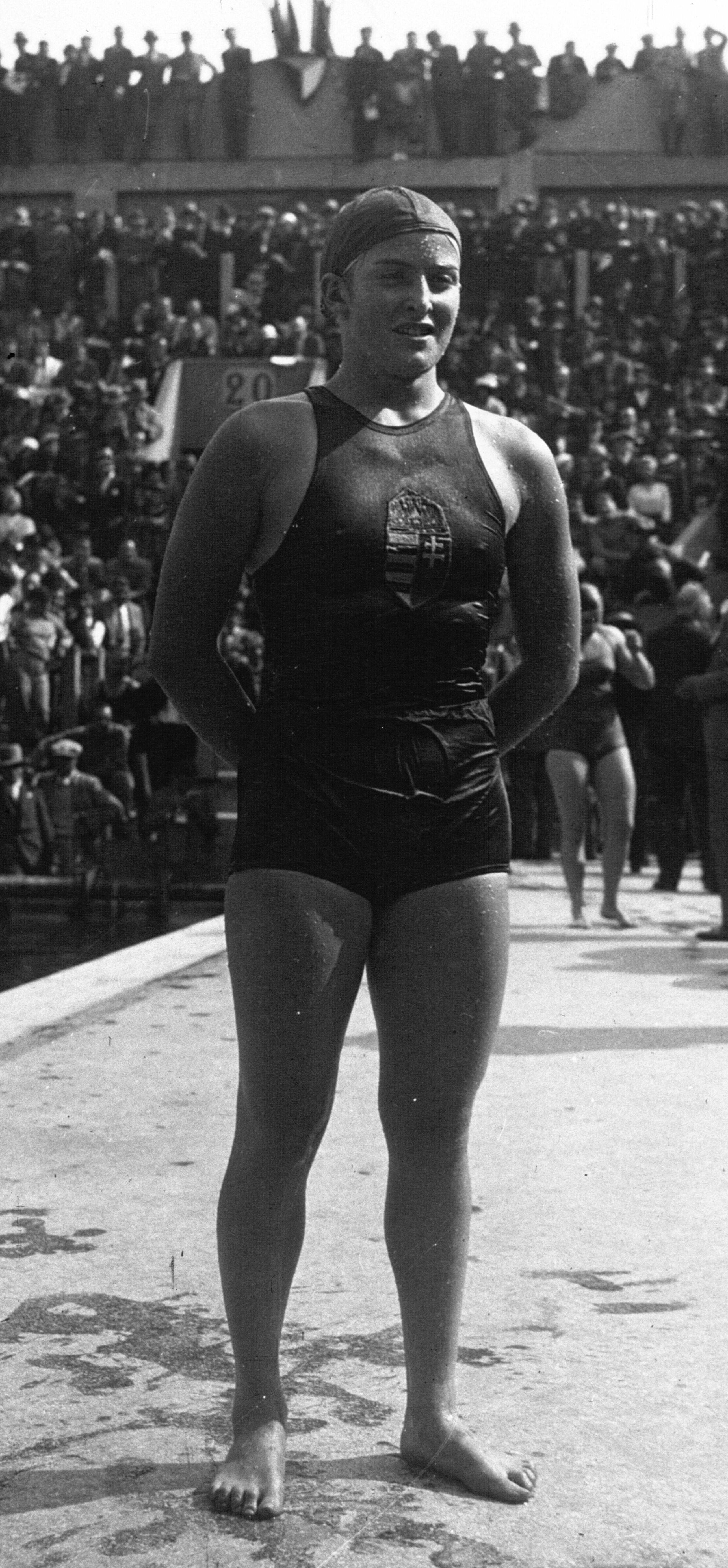 Les Tourelles : Championnats d'Europe : Melle Lenkei (Hongrie) (portrait à 3 m) : [photographie de presse] / Agence Meurisse